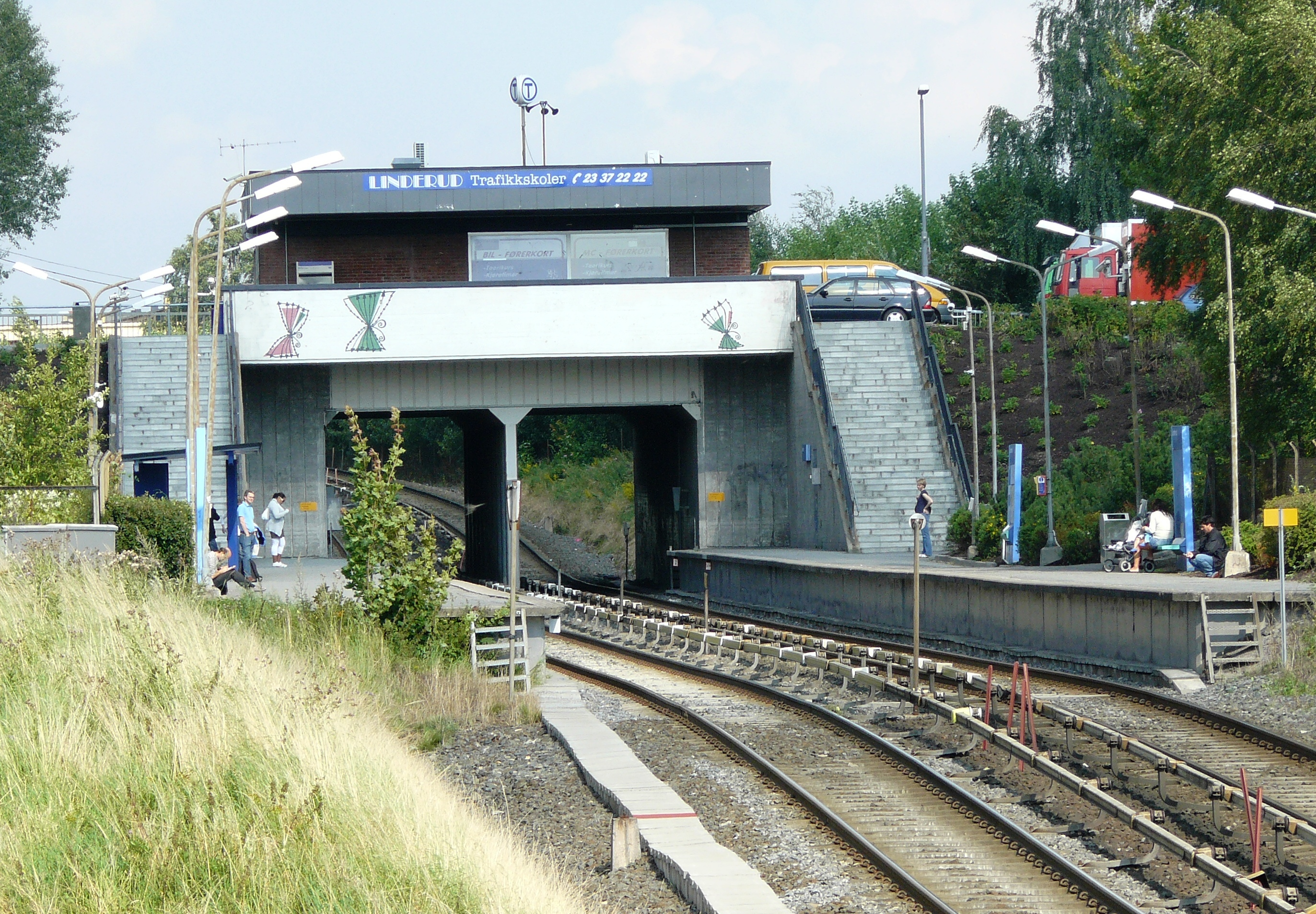 Linderud t-banestasjon, Oslo subway